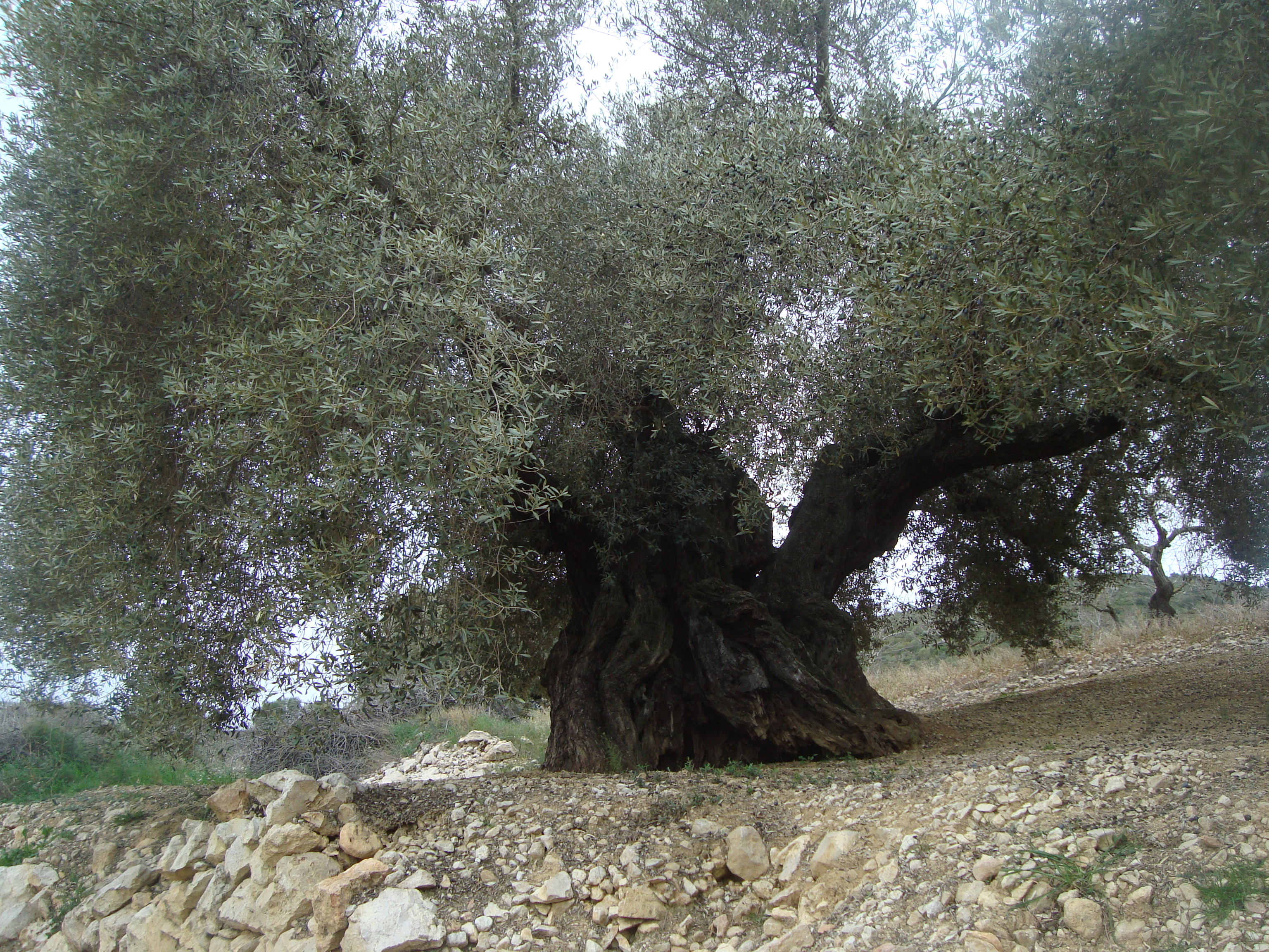 Olivera mil·lenària (Les Coves de Vinromà)